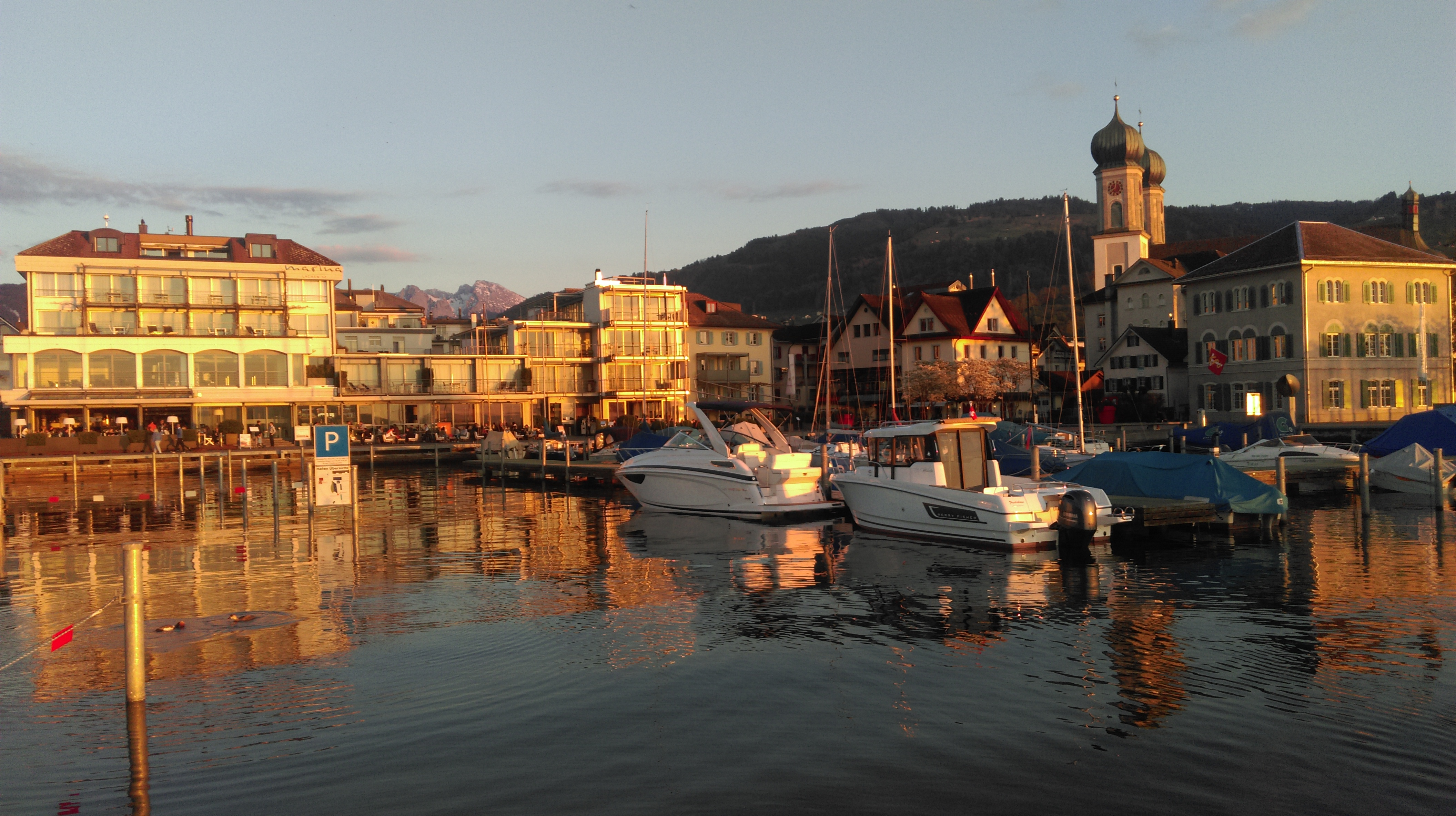 Marina Lachen SZ